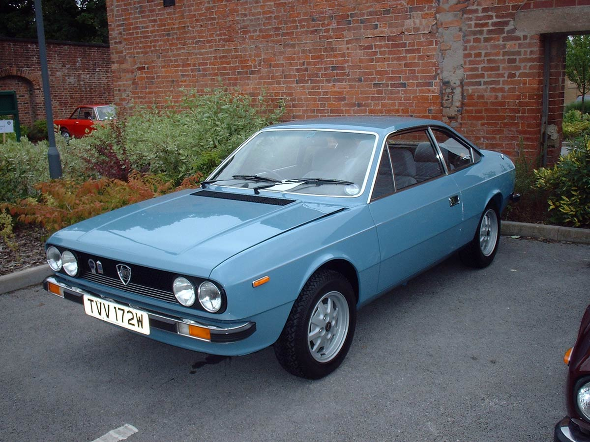 Lancia Beta Coupe